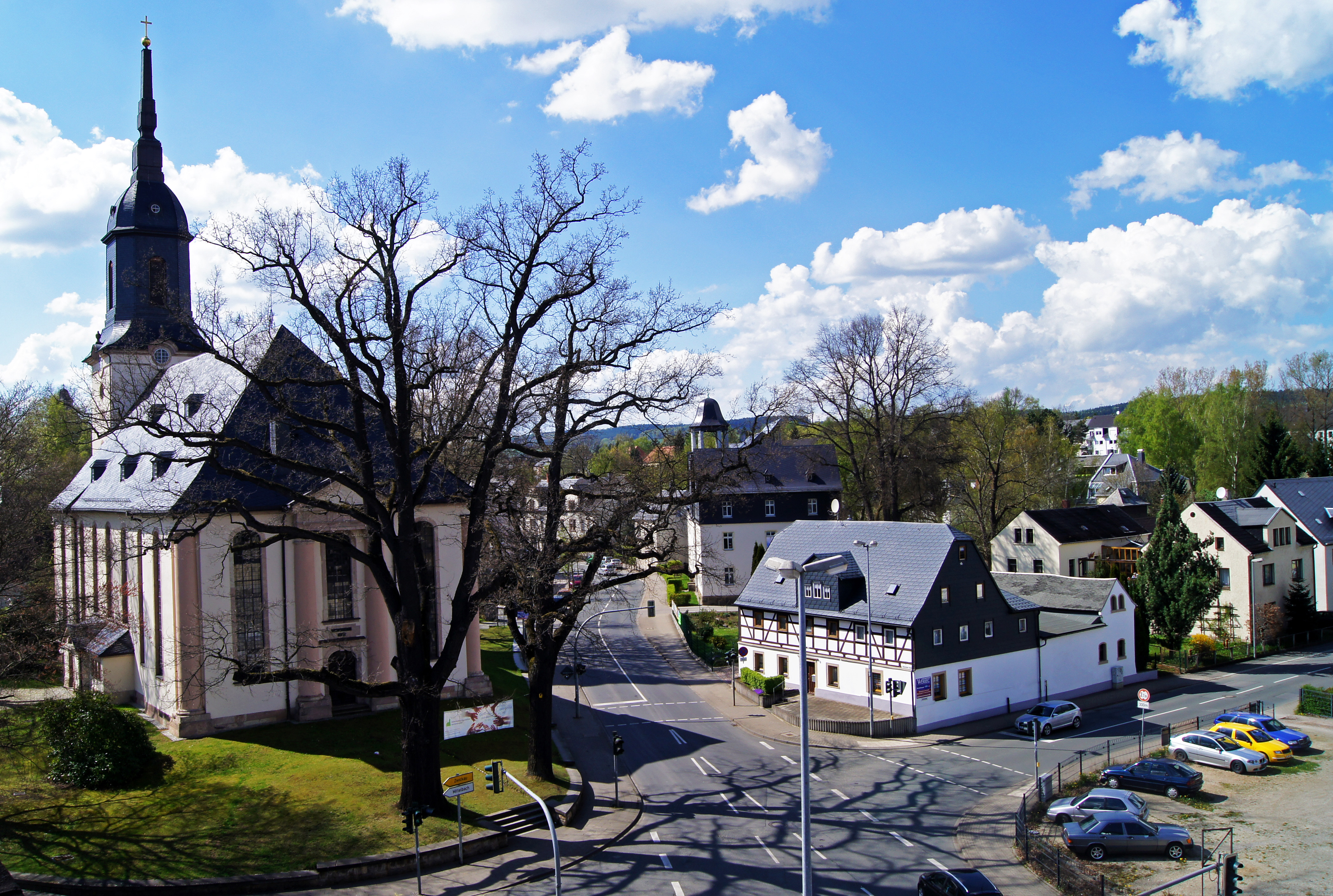 Blick zur Johanniskirche und zum ehemaligen Rathaus mit seinem glockenförmigen Turm. Links vom Kirchturm ist die Kuppel der Schule sichtbar.